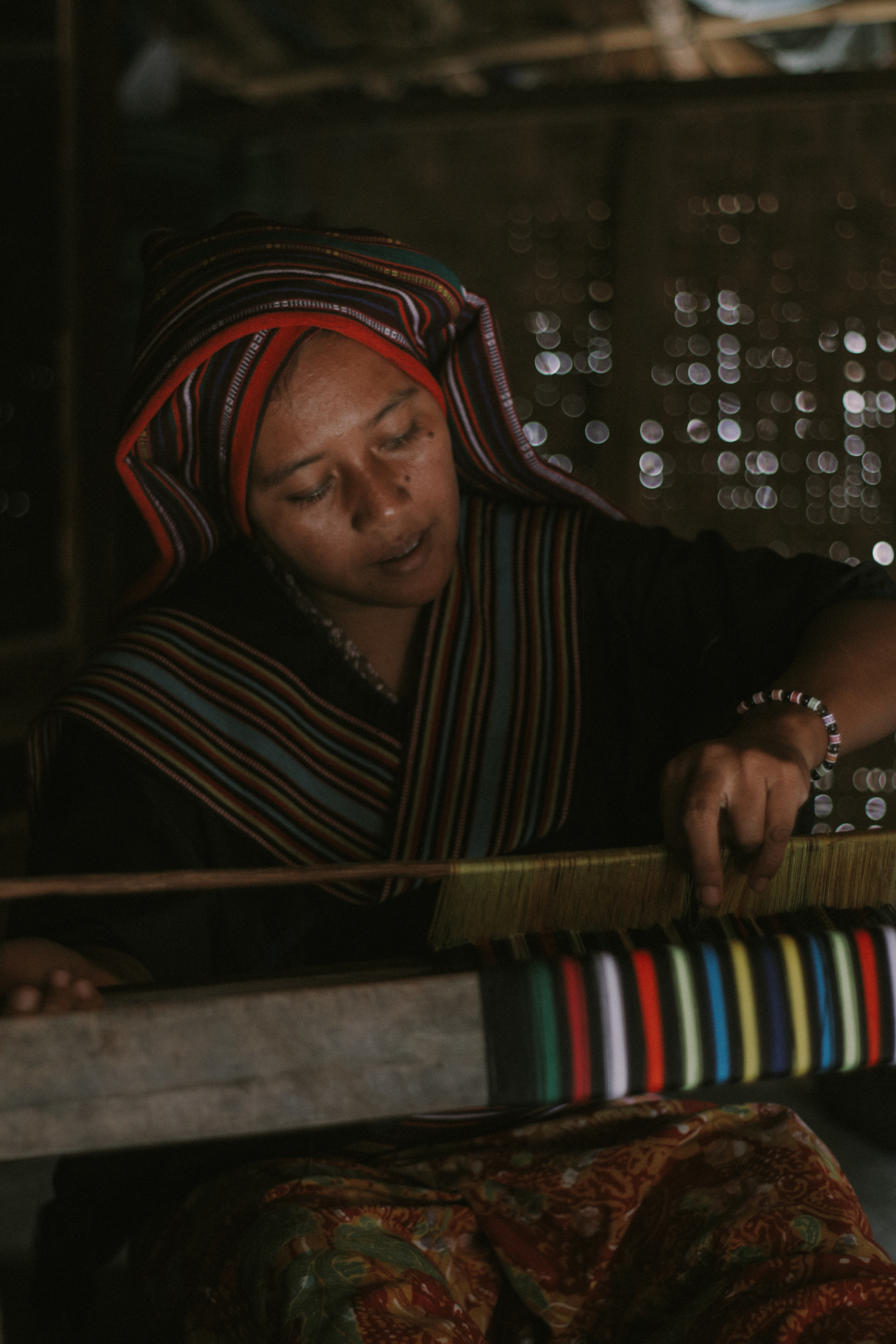 Seorang Wanita setengah baya sedang menenun kain tradisional khas Sasak, yang disebut songket, "Pulih Tuturan" dalam bahasa Sasak adalah dapat cerita, dikarenakan saat pengambilan foto, Wanita ini membuat Songket sambil bercerita.